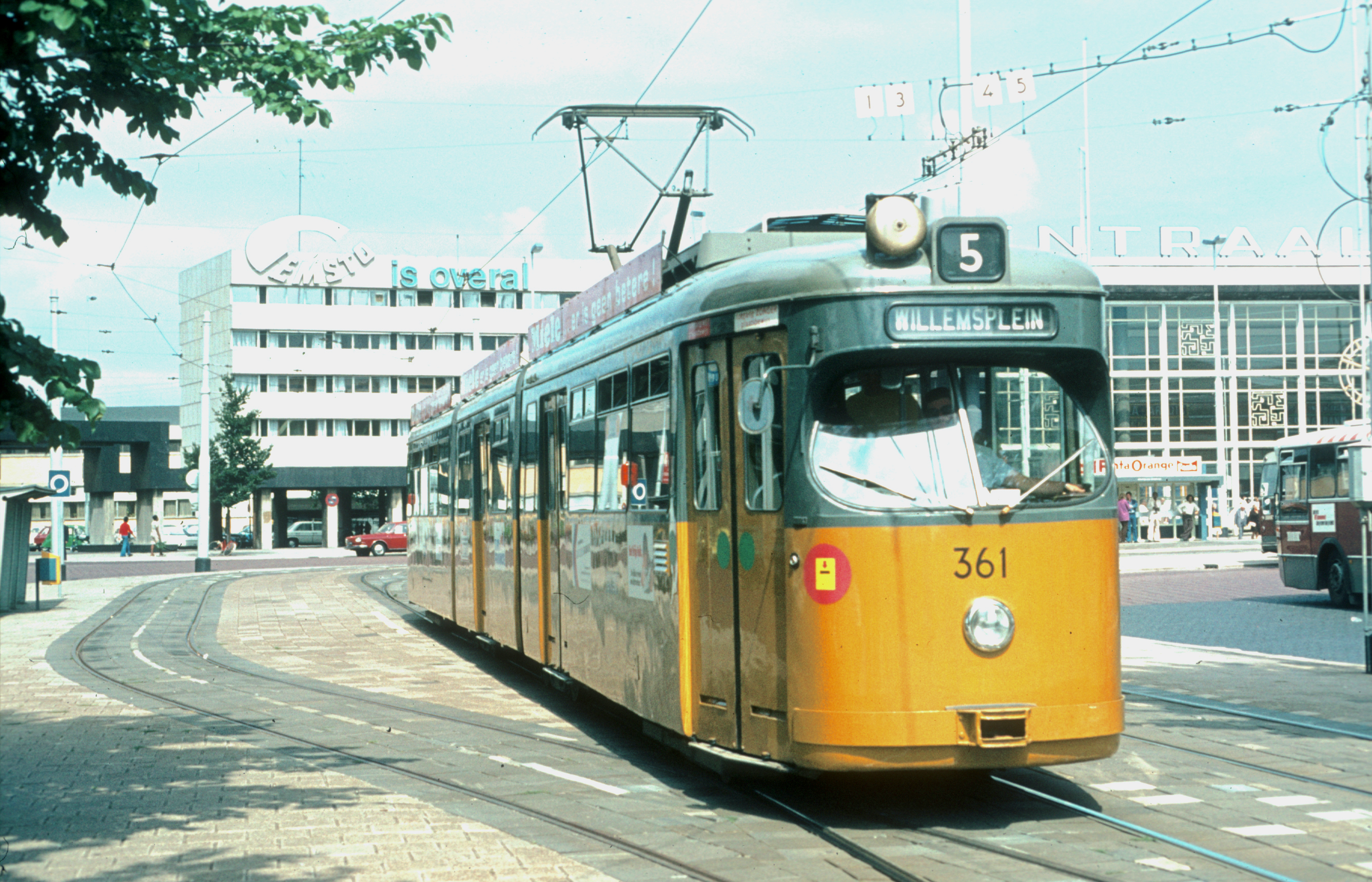 Rotterdamse Elektrische Tram N.V. (RET), Düwag tram 361 te Rotterdam.